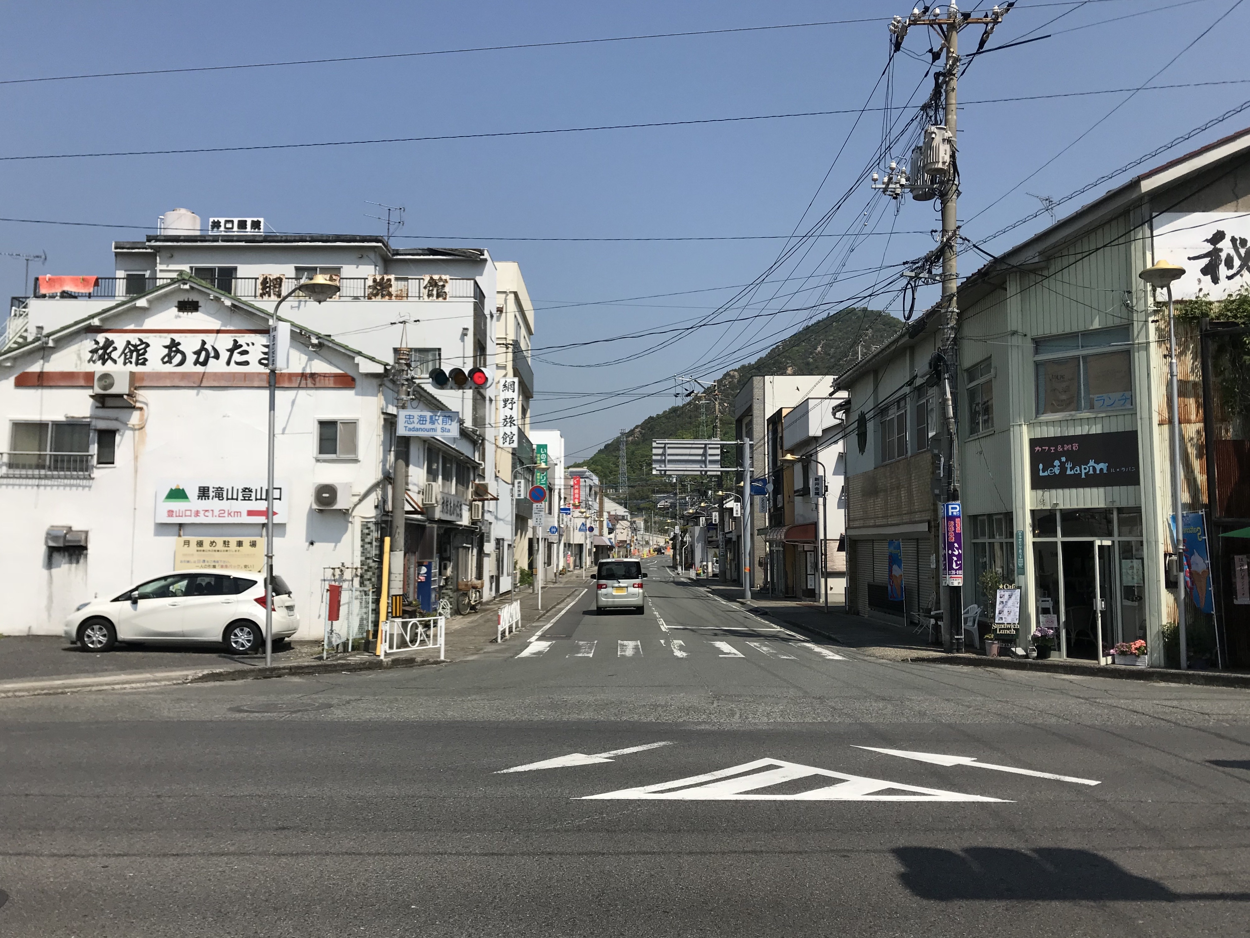 忠海駅前の広島県道59号